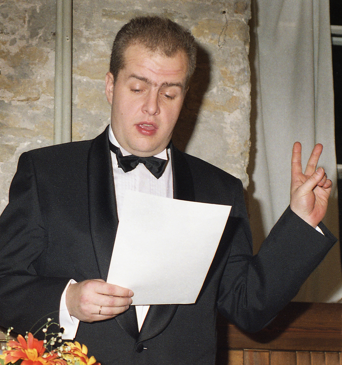 Aarne Valmis, meelelahutusärimees 97